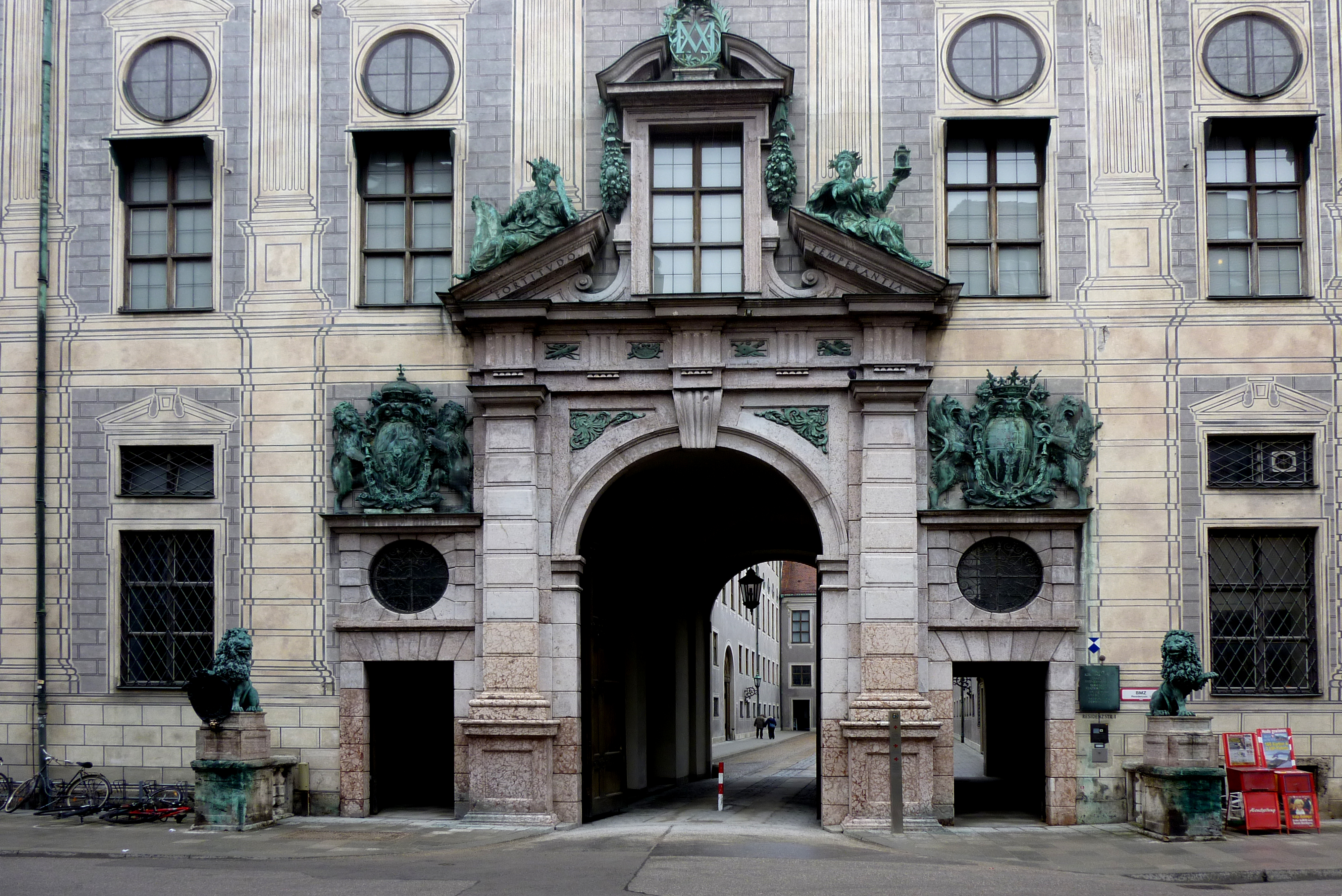 Rezidenciaépület homlokzatrészlete Münchenben